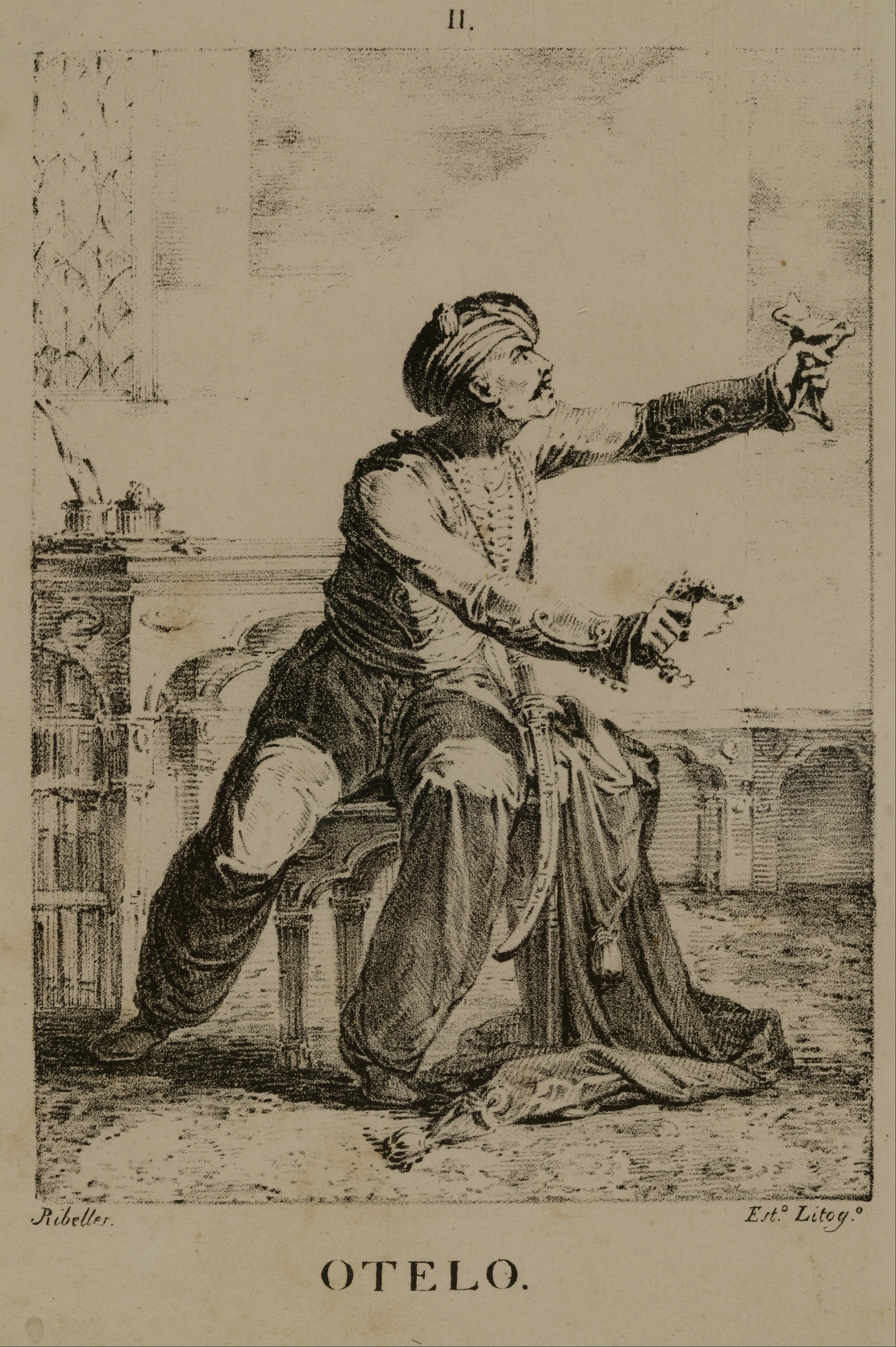 El actor murciano Isidoro Máiquez en el papel de “Otelo”.